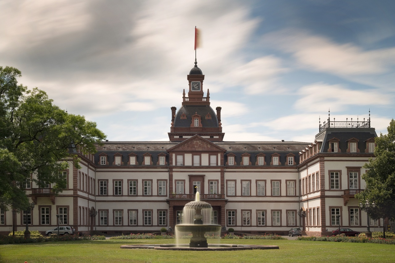 View of the castle during the sommer months of 2014, whilst being renovated